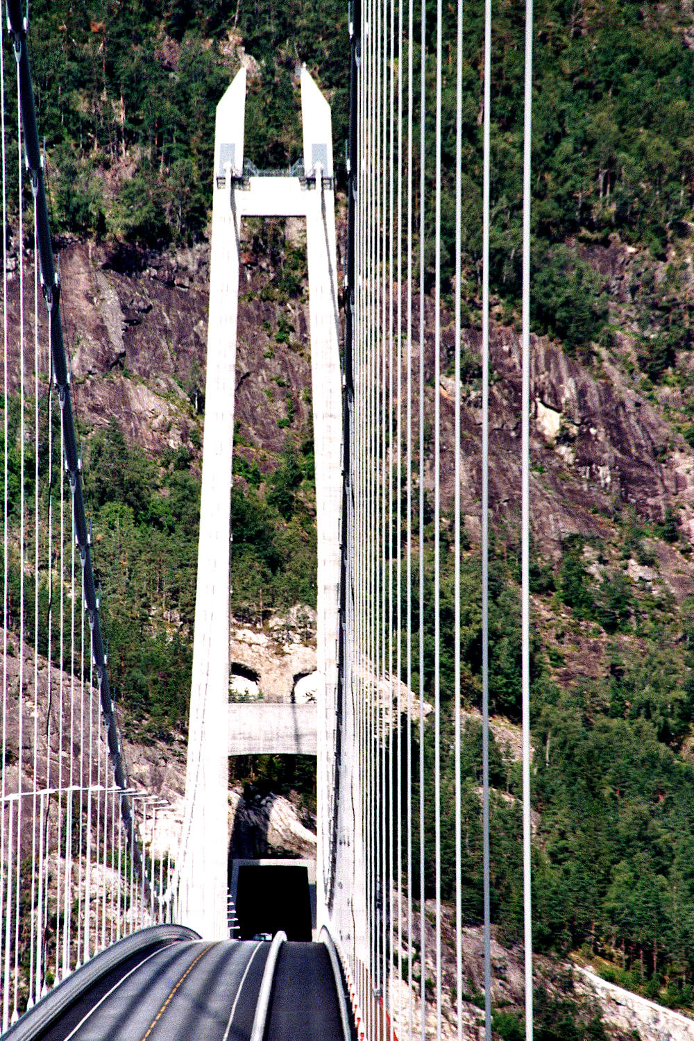 Hardangerbrua